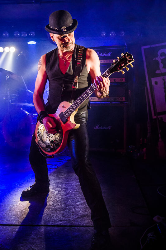 Piotr Chancewicz, gitarzysta zespołu Mech podczas koncertu charytatywnego Stefan Fest w klubie Fonobar w Warszawie, 1 maja 2013.